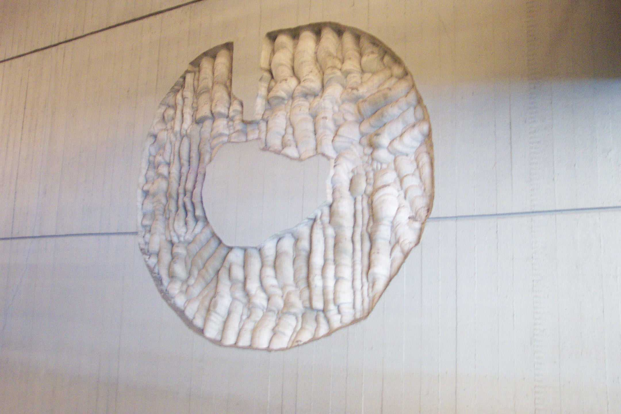 Decoration in Dům bytové kultury in Prague - ornament v Domu bytové kutury v Praze